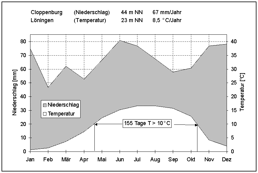 Klimadiagramm Bereich Cloppenburg (Stadt)